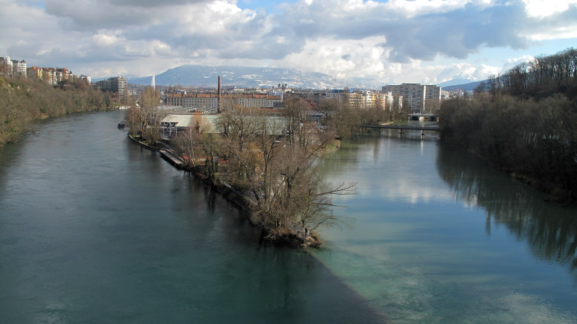 Rando le long de l'Arve (06.12.12) -Jonction- du Rhône et de l'Arve